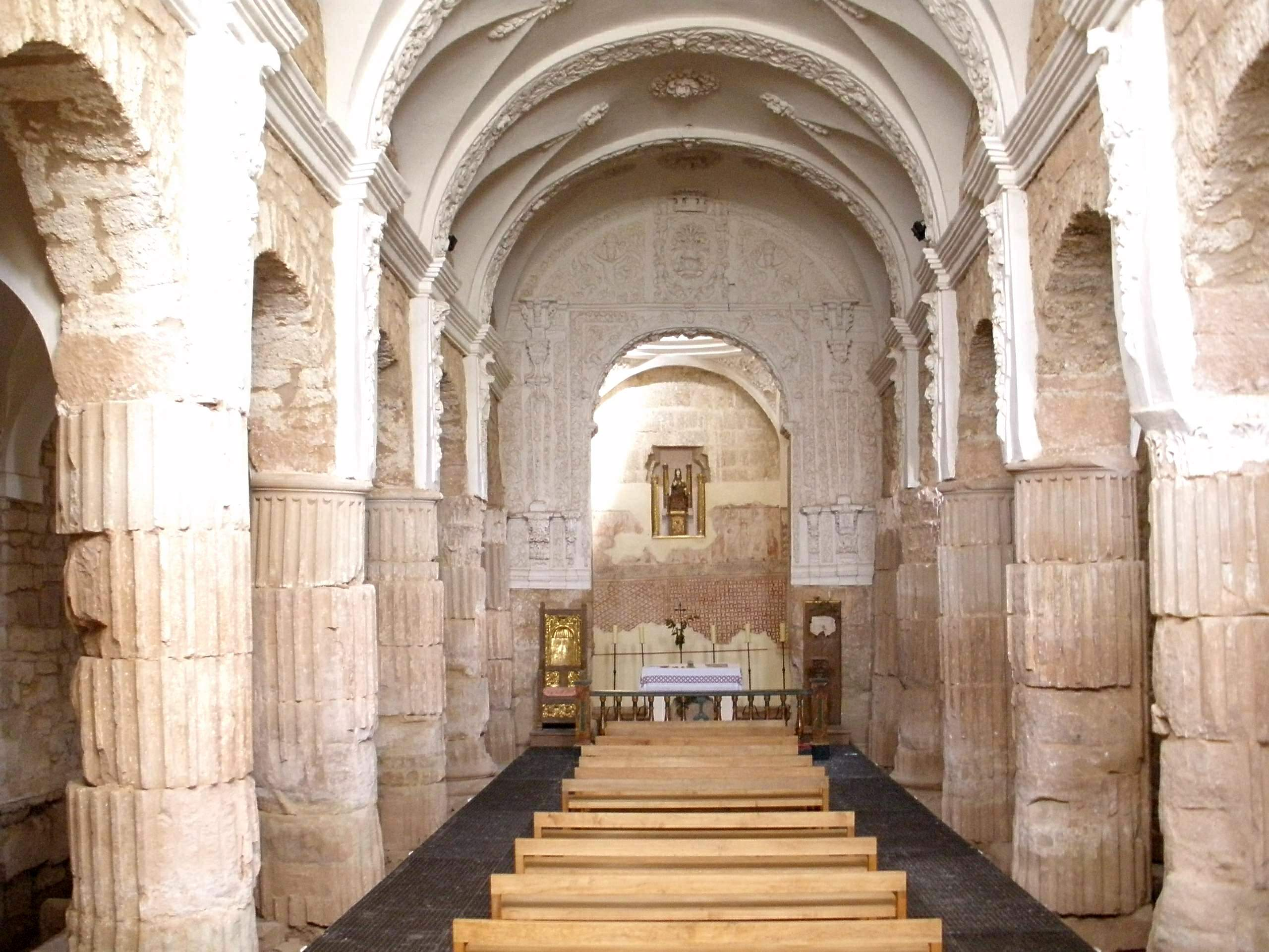 Basílica de Santa María de los Arcos, Tricio (La Rioja)